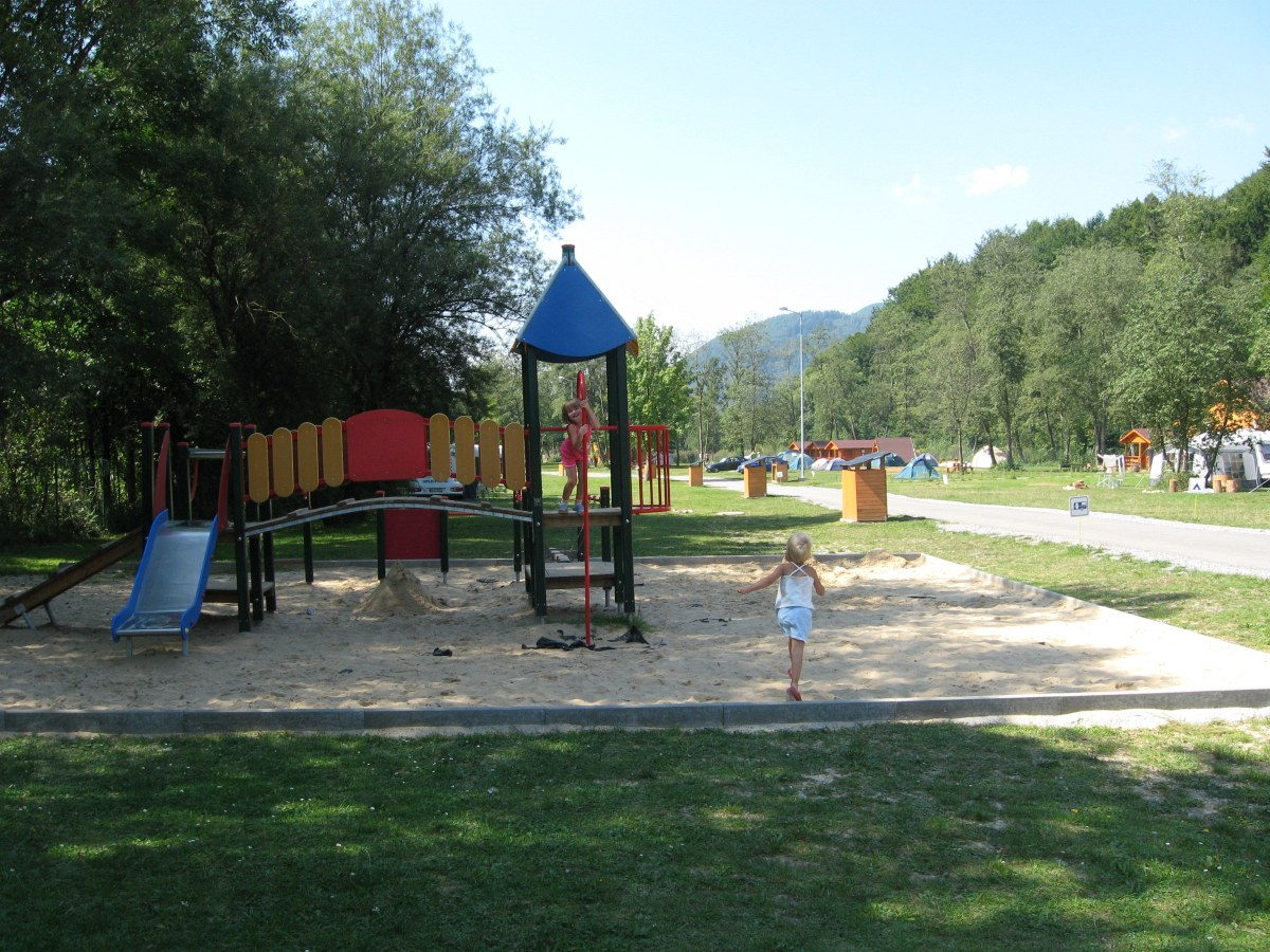 Słowacja - Nižné Kamence - autocamping Belá